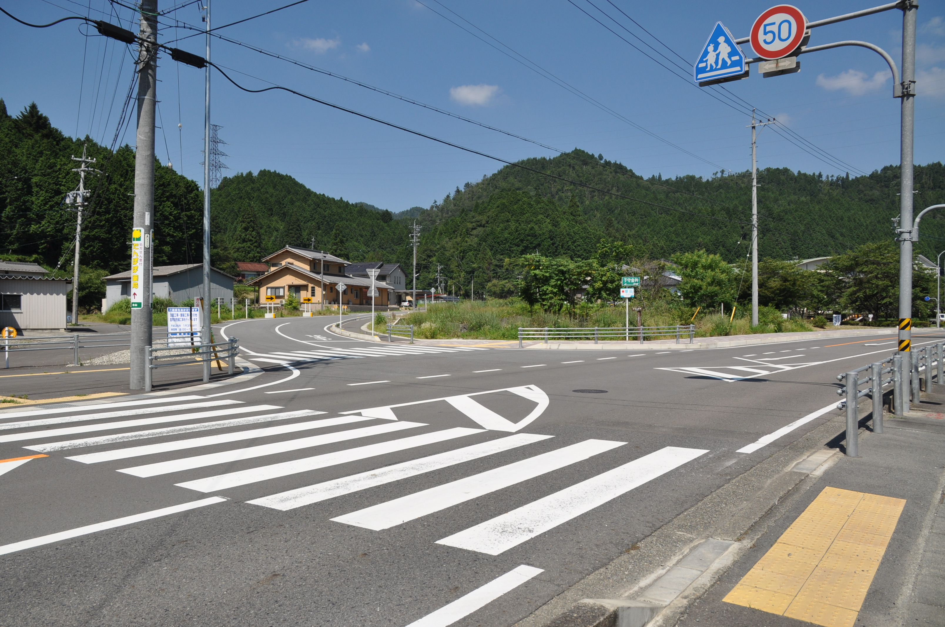 美濃東部広域農道 岐阜県下呂市金山町国道256号線入口